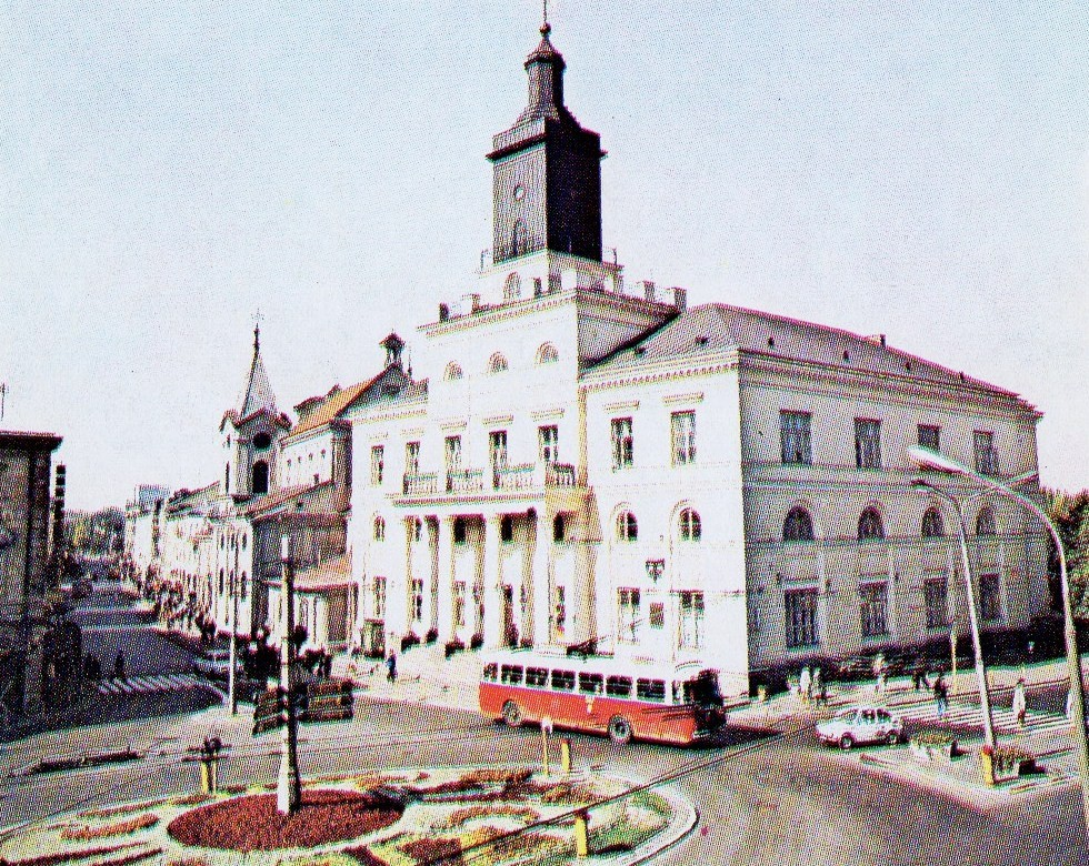 Lublin - przed 1977.